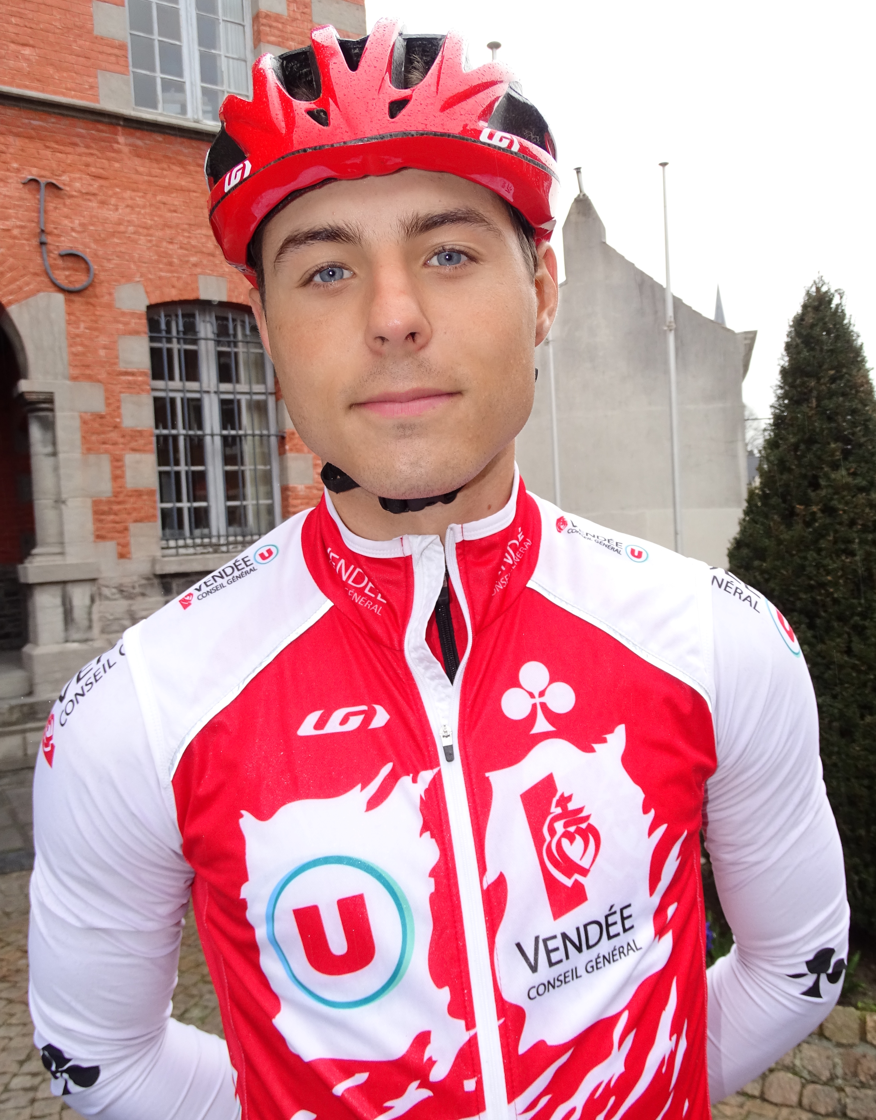 Triptyque des Monts et Châteaux 2015 Depicted person: Romain Cardis Depicted team: Vendée U